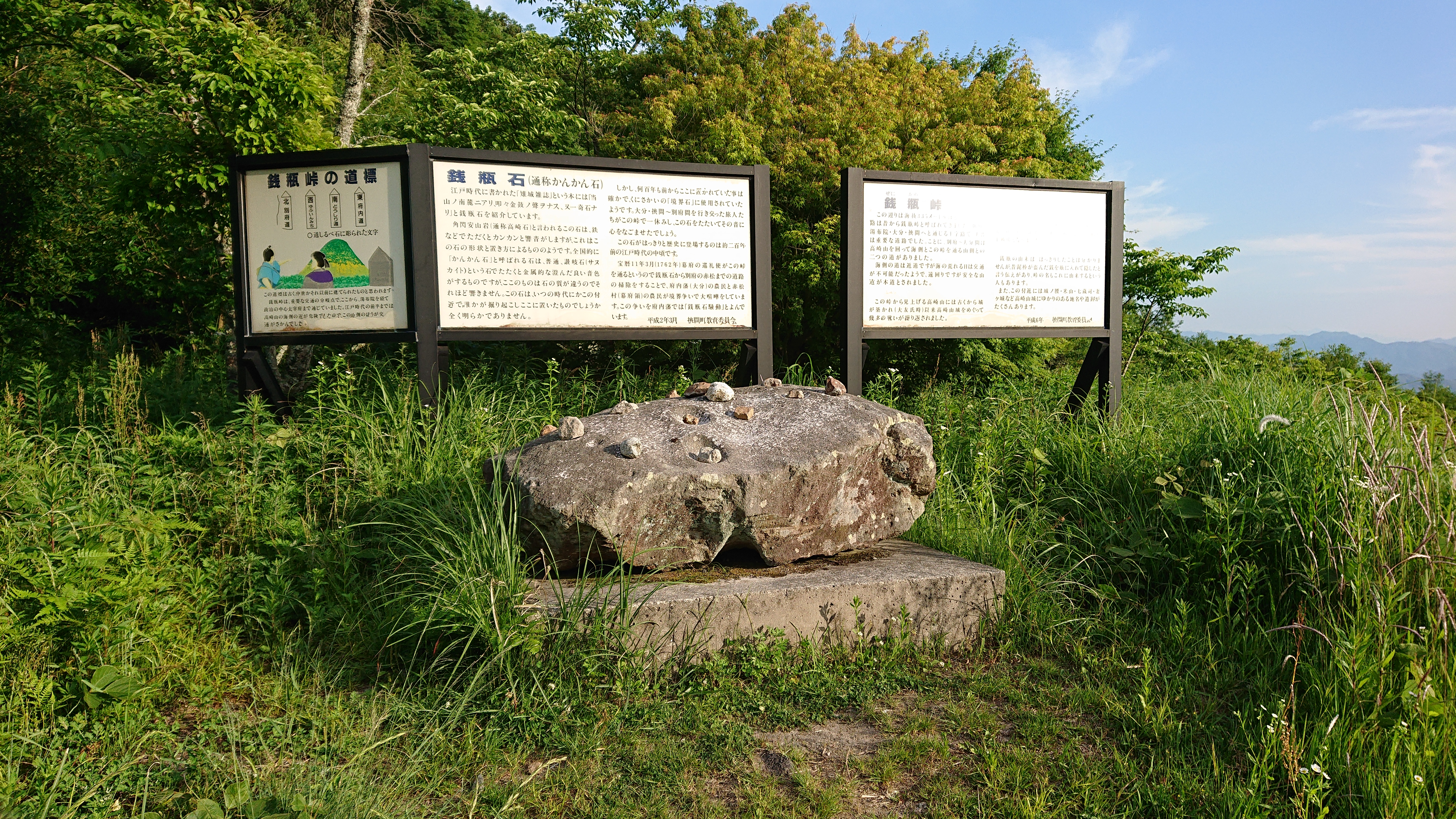 大分県の銭瓶峠にある、かんかん石